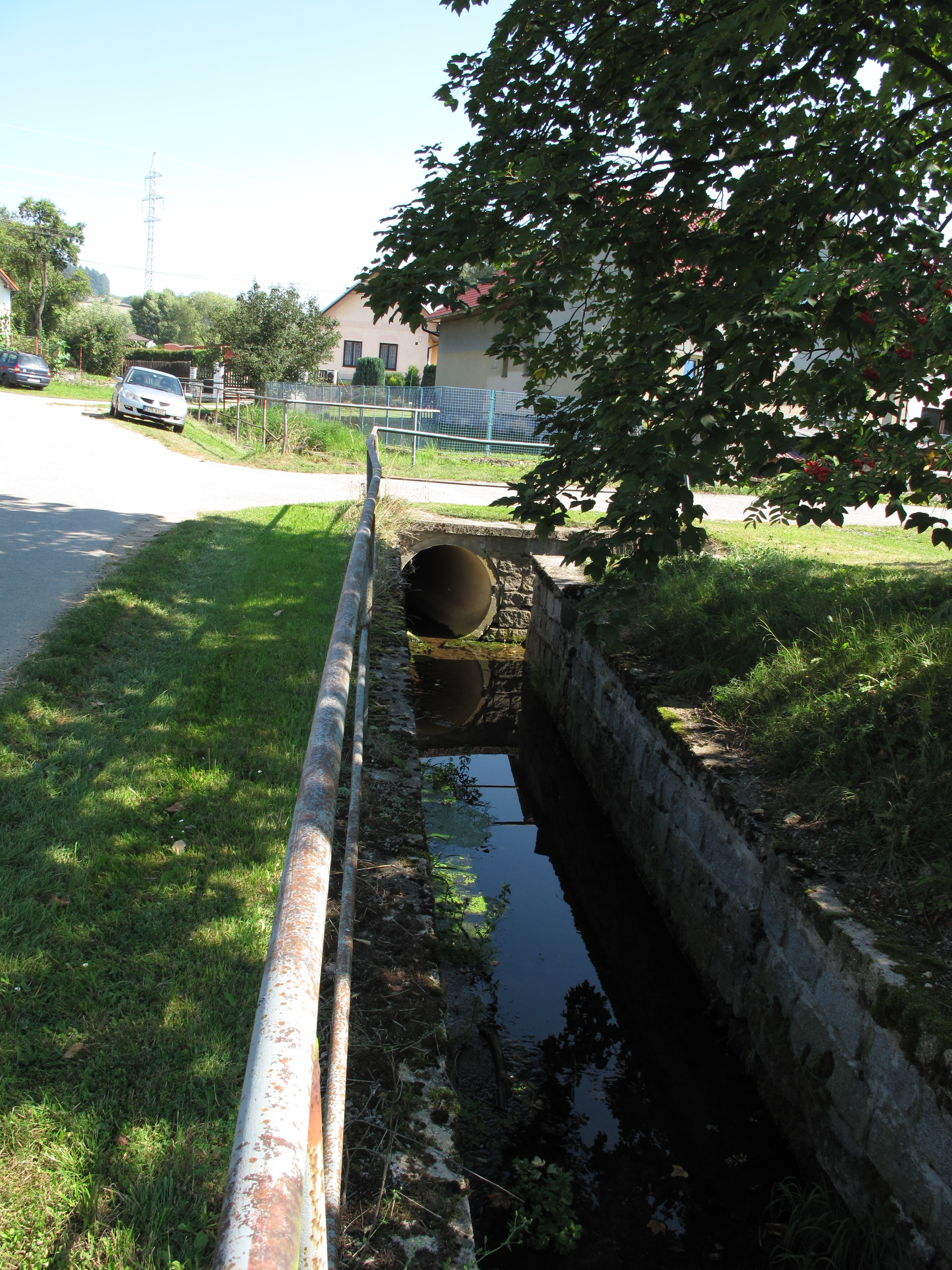 Chýnovský potok v Horních Hořicích. Okres Tábor, Česká republika.